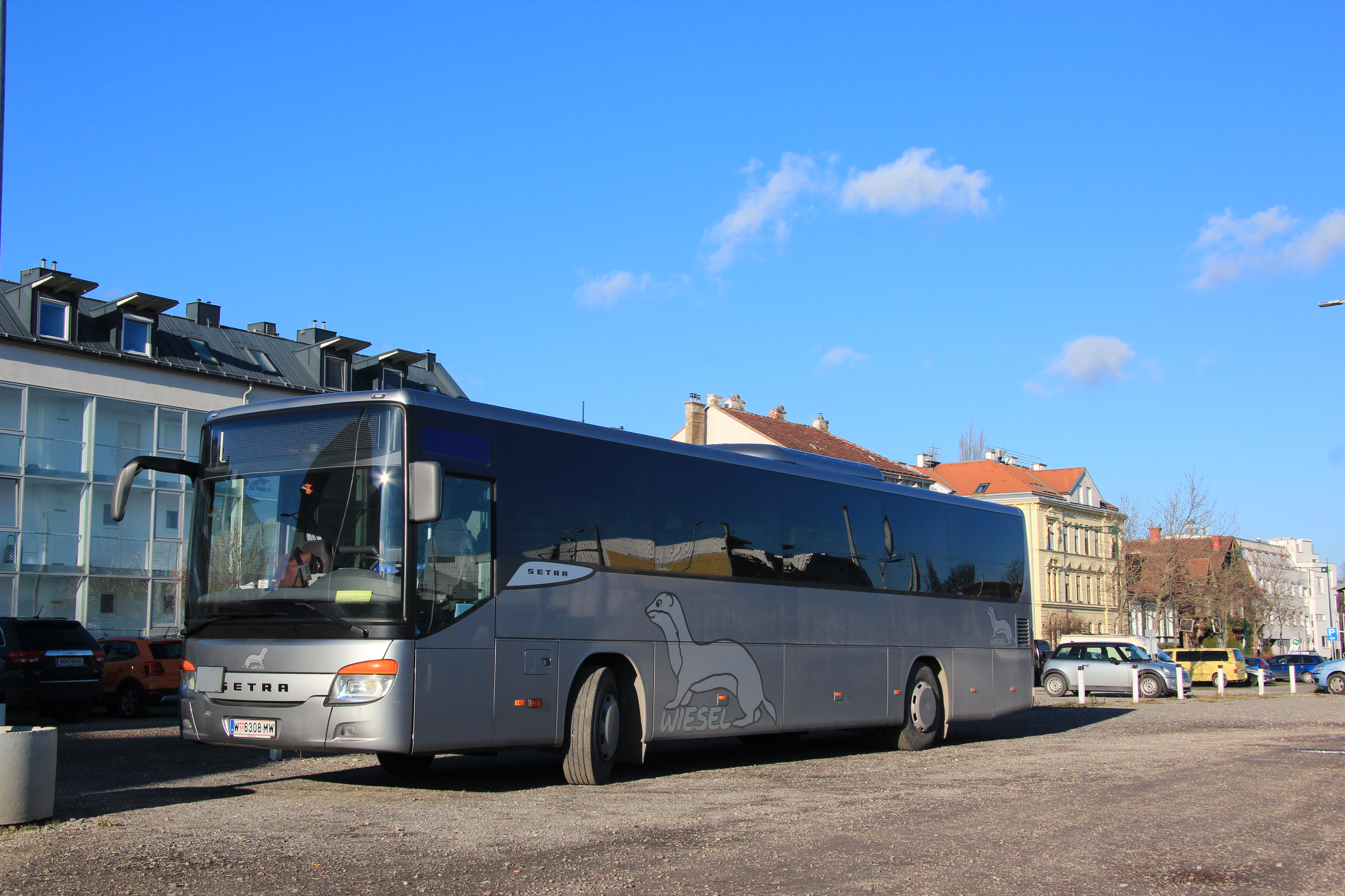 Wiesel-Bus in Mödling